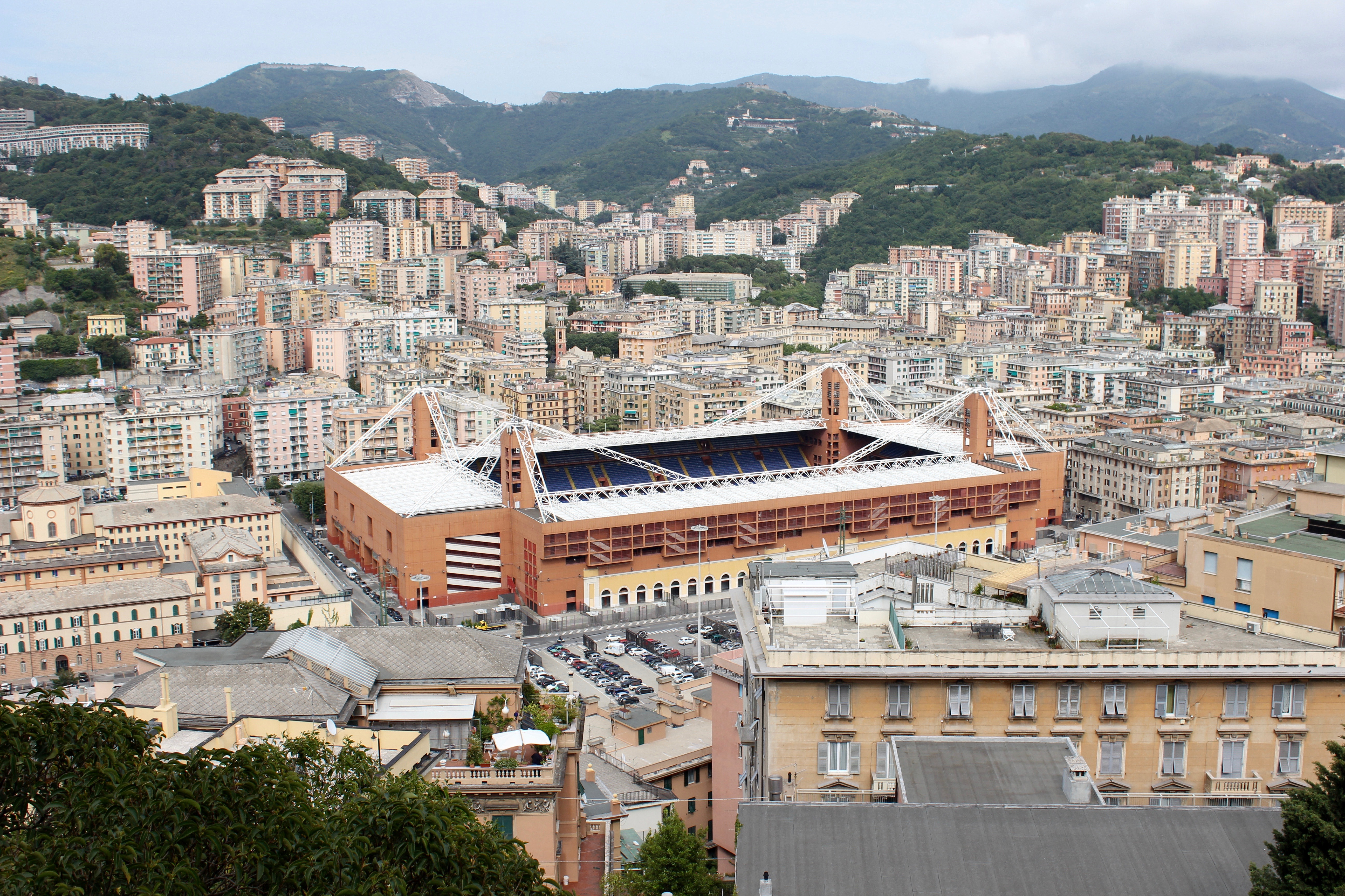 Lo stadio Luigi Ferraris visto da S. Bartolomeo